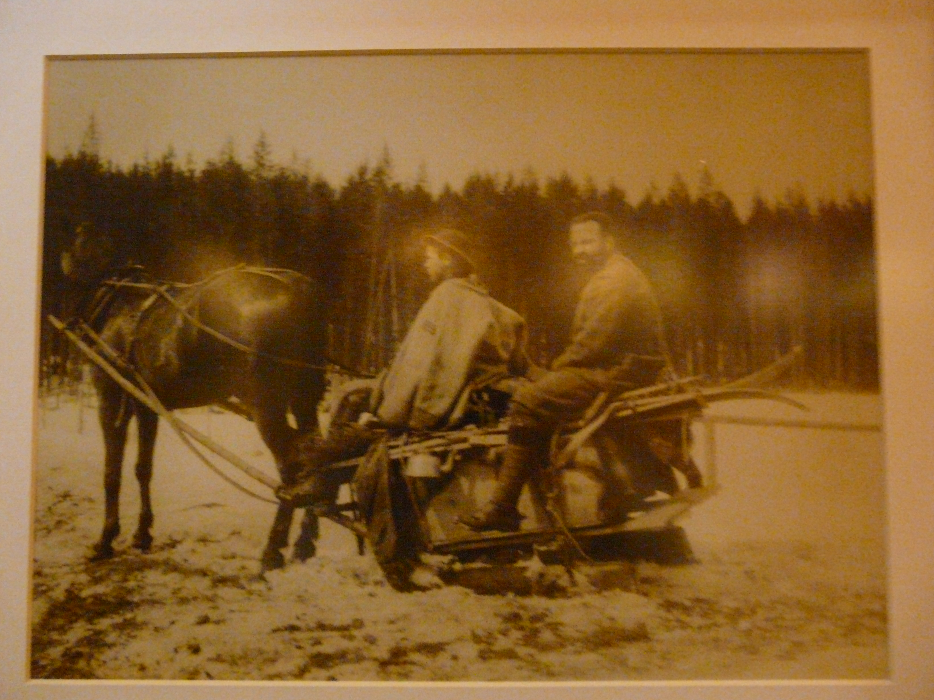 Zakopane. Zespół dworsko-parkowy w Kuźnicach, okolice i wnętrza. Książę Kazimierz Lubomirski wyjeżdża polować na głuszca, 1907 r.